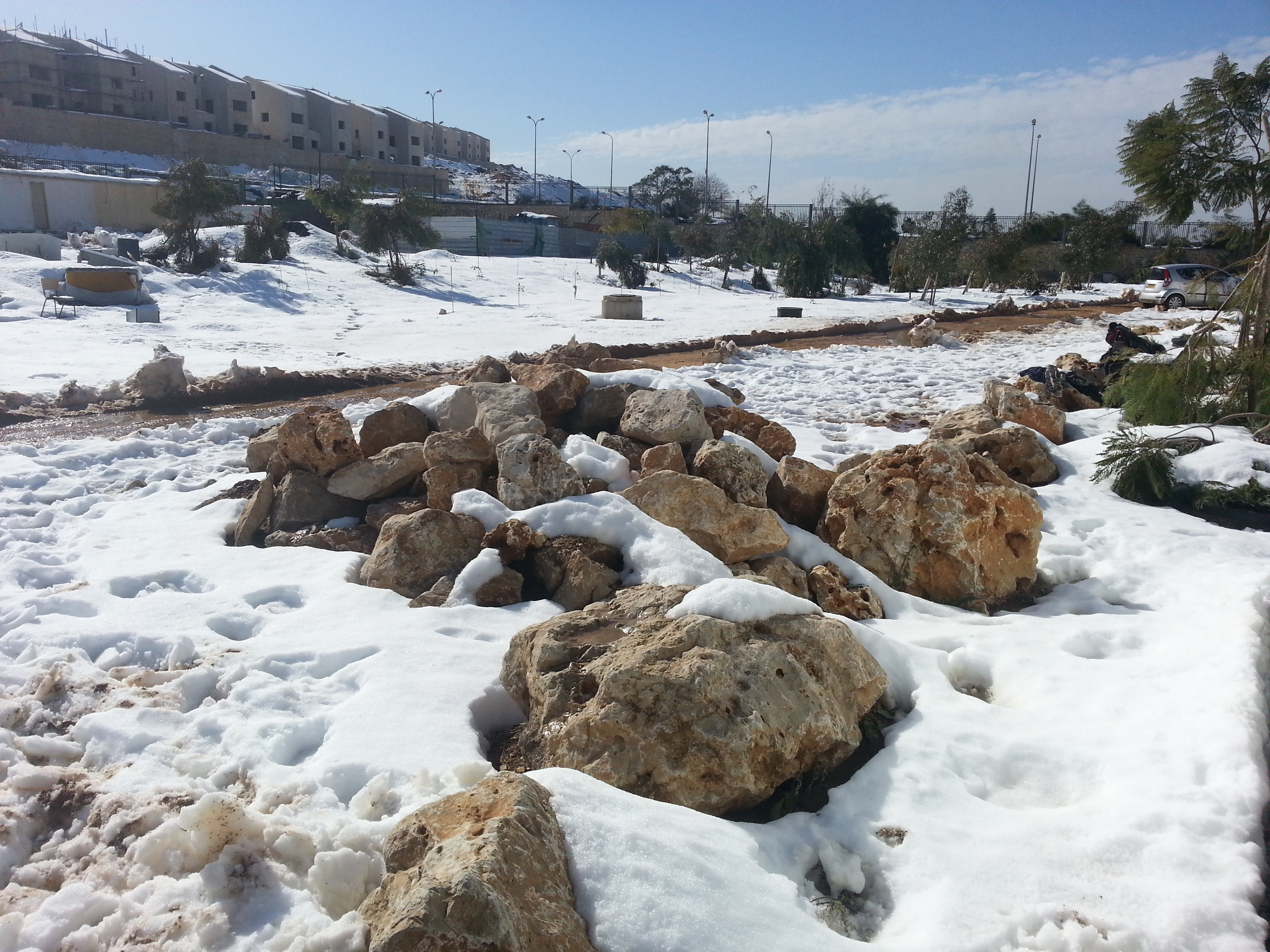 שלג במגורי הסטודנטים (מתחם הקראוונים) באוניברסיטת אריאל